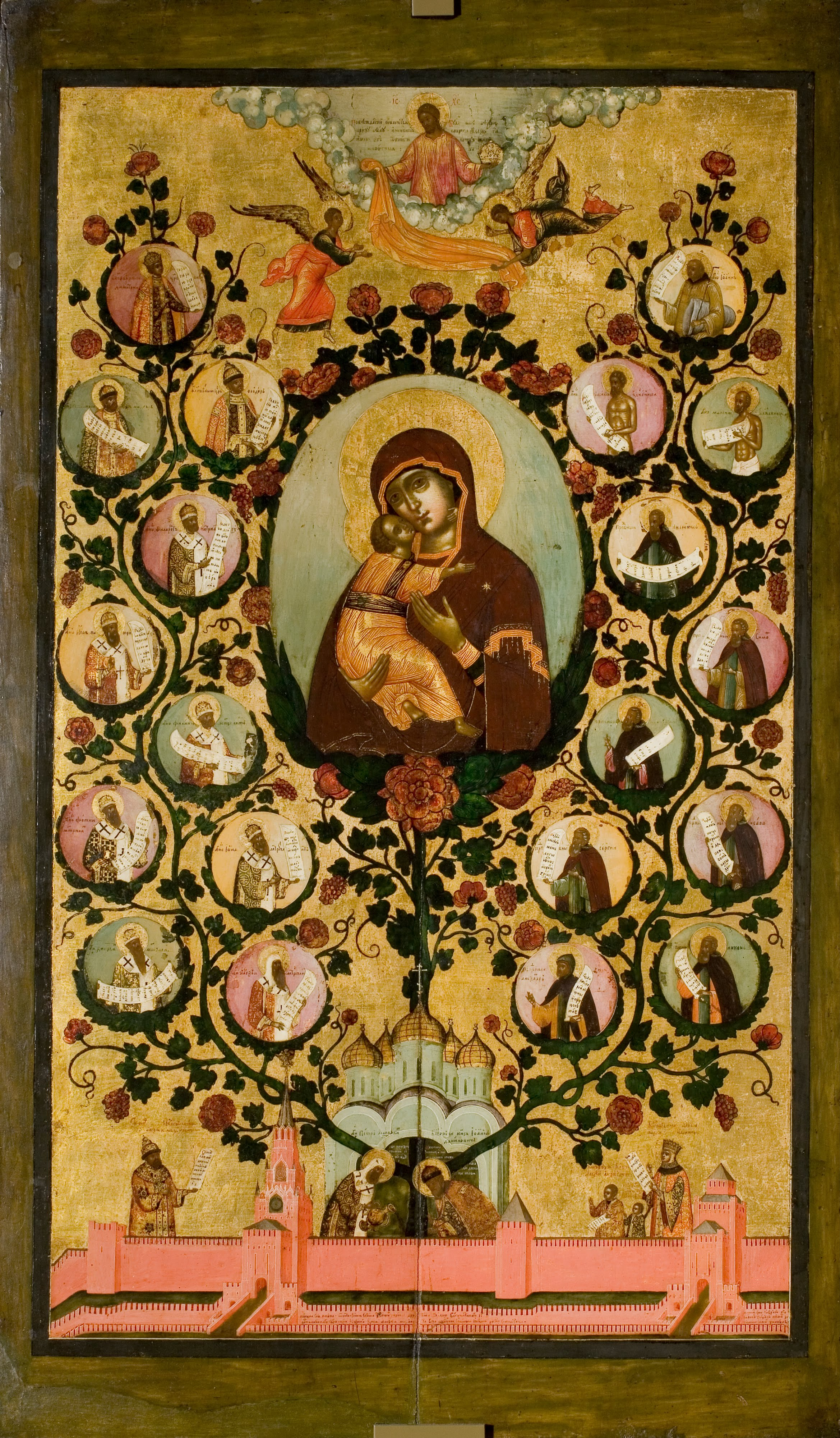 Внизу на изображении кремлевской стены в среднике надпись с датой; справа в нижнем углу авторская подпись: А писал сии образъ его государевъ зографъ Пимин зовомый Симон Ушаковъ. На фоне Успенского собора изображены первый московский митрополит Петр и князь Иван Данилович Калита. Они сажают и поливают дерево, которое как бы прорастает сквозь Успенский собор, заполняя ветвями всю поверхность иконы. На ветвях древа – медальоны с изображением московских святых, а в центральном самом большом медальоне – образ Богоматери Владимирской. За кремлевской стеной стоят царь Алексей Михайлович и его первая жена Мария Ильинична, урожденная Милославская, с детьми. Наверху в облаках Спас, вручающий парящим ангелам венец и ризу для Алексея Михайловича: царь небесный венчает царя земного. Изображения святых в медальонах располагаются снизу вверх с некоторыми отступлениями от исторической последовательности, как бы сообразуясь с «ростом» дерева. На левой ветви, за митрополитом Петром представлены отцы русской церкви: митрополиты Алексий, Киприан, Иона, Фотий и Филипп, патриархи Иов и Филарет, цари Михаил Федорович, Феодор Иоаннович, царевич Дмитрий. На правой ветви в первом медальоне изображен дед Ивана Даниловича Калиты князь Александр Невский в одежде схимника. За ним – основатели и настоятели близких к Москве монастырей – преподобный Никон Радонежский, преподобный Сергий Радонежский, преподобный Савва Сторожевский, преподобный Пафнутий Боровский преподобный Симон безмолвник, преподобный Андроник и московские блаженные Максим, Василий, Иоанн Большой колпак.